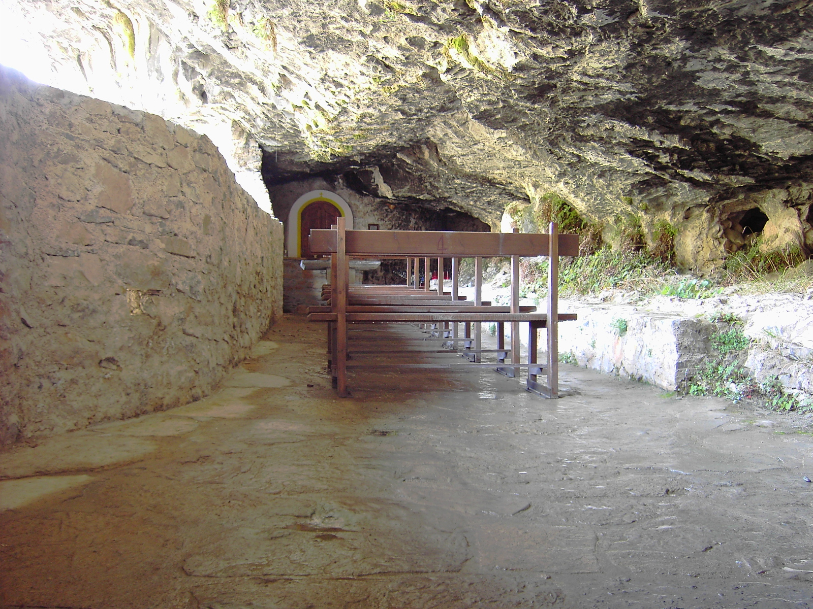 La Ermita de San Urbez, o San Urbicio en castellano, vista desde dentro.